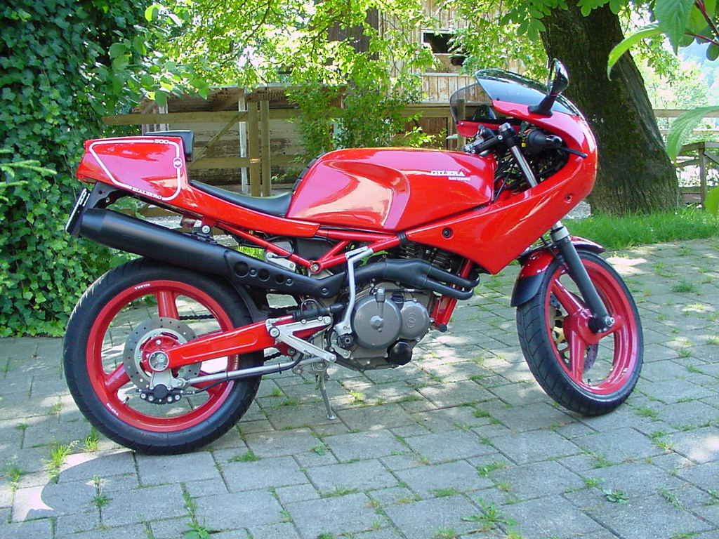 Gilera Saturno 500 Bialbero, rot